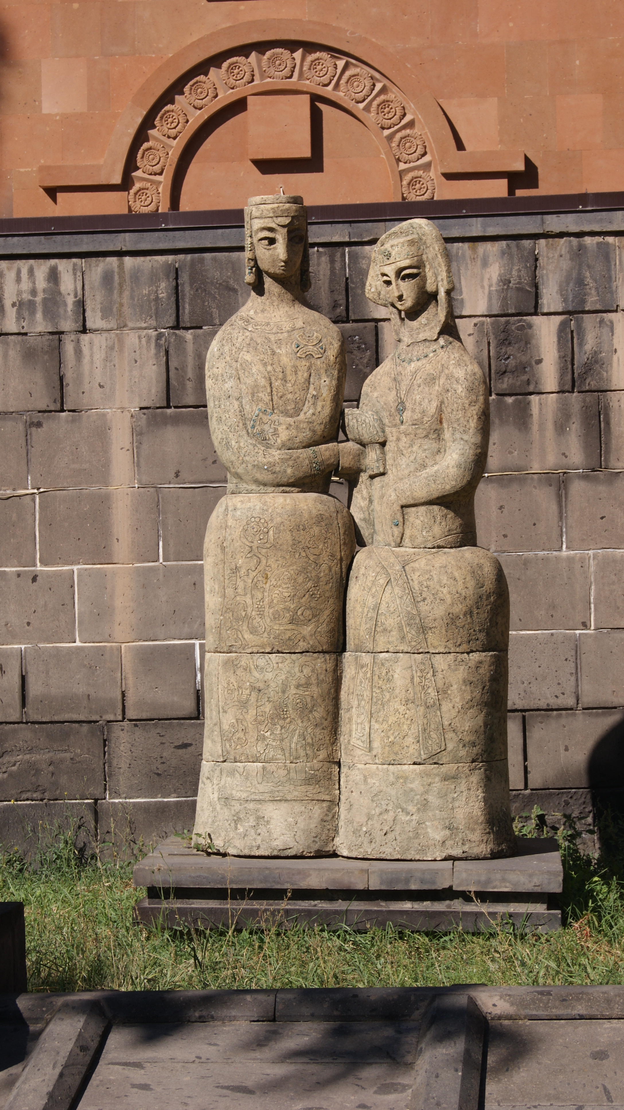 Քանդակ «Ընկերուհիներ», Գյումրու կենցաղի թանգարանի (Ձիթողցոնց) բակում 1/4.345.1